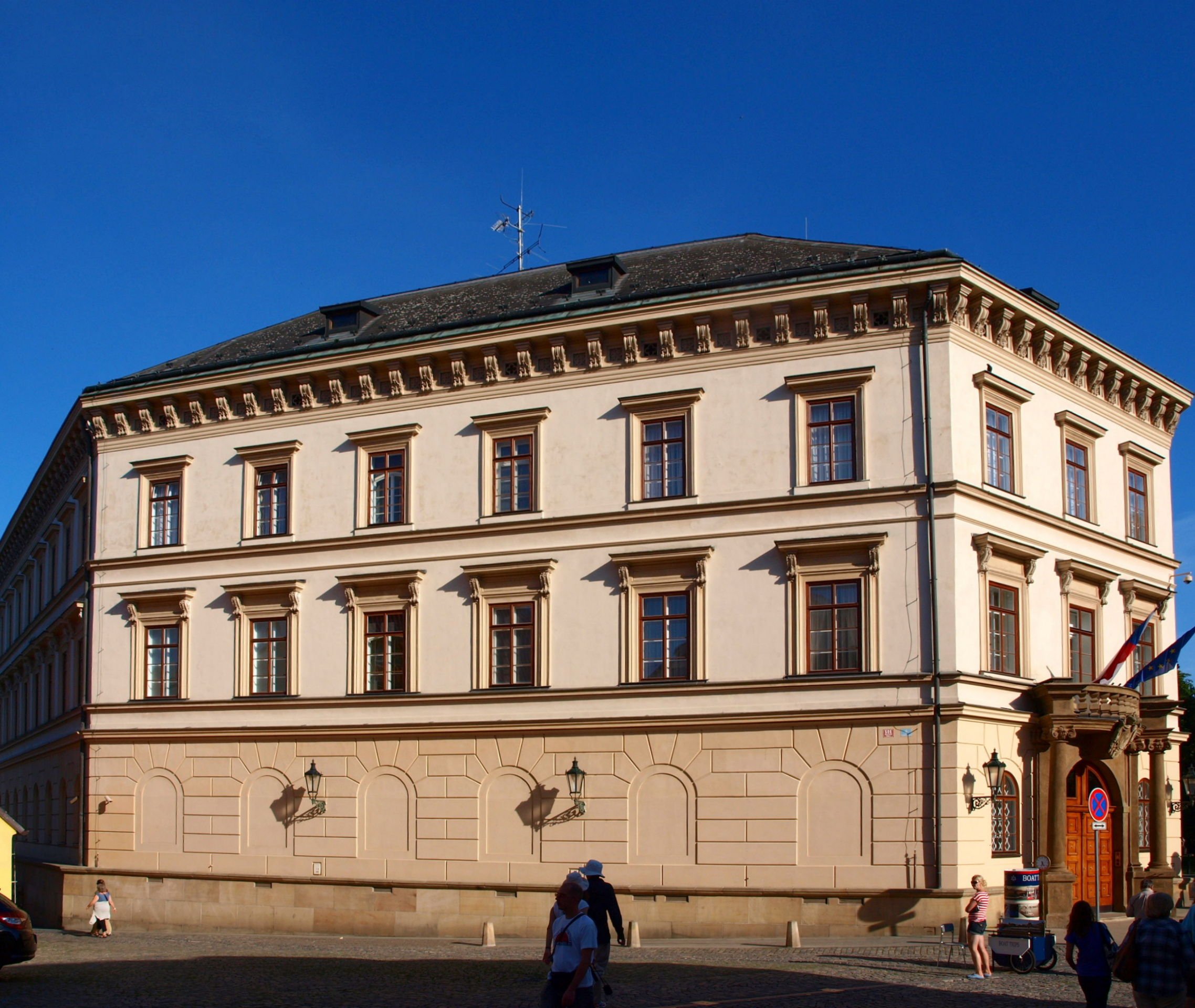 Lichtenštejnský palác na Kampě